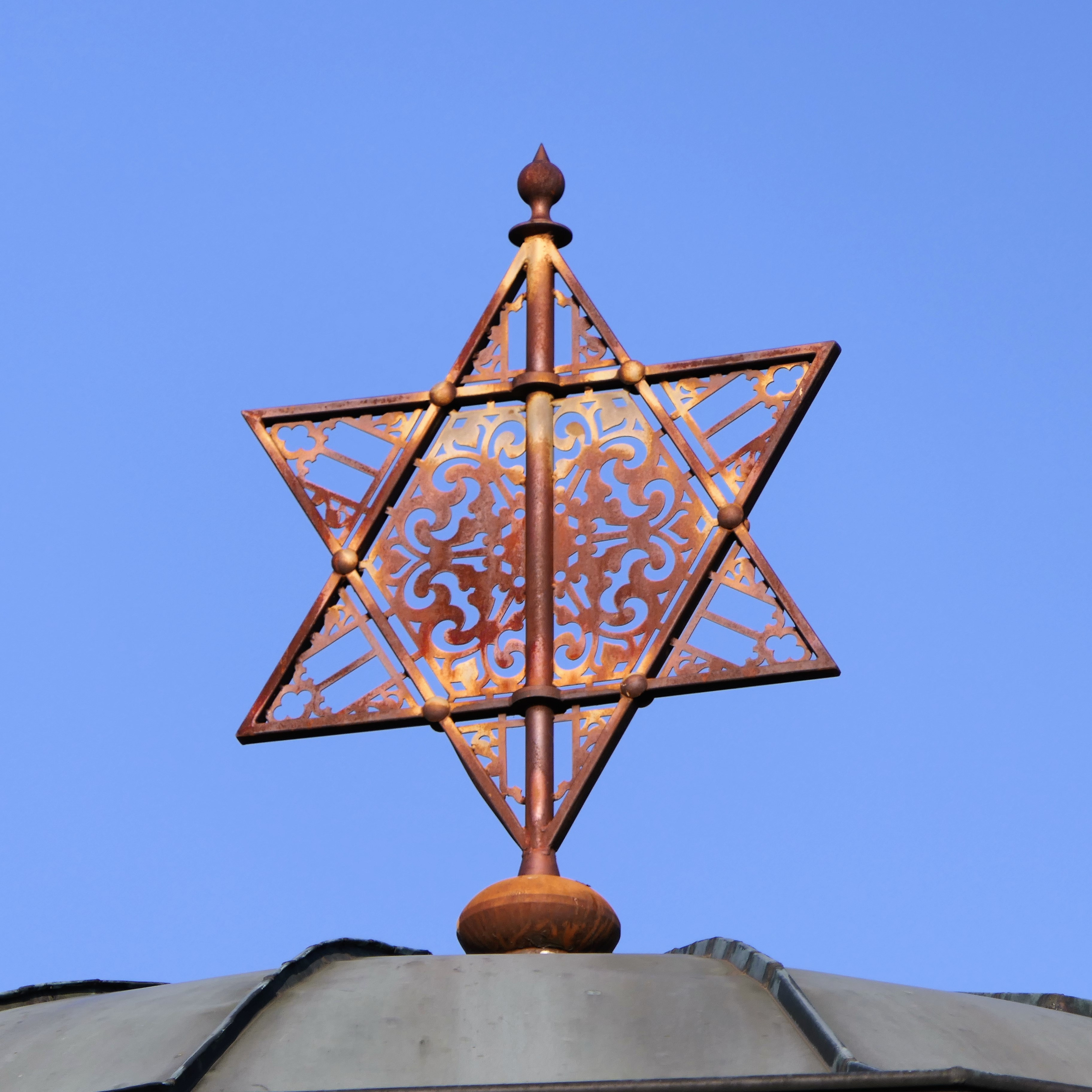 Davidstern der einstigen Semper-Synagoge (Alte Synagoge Dresden), heute auf der Kuppel der Totenhalle des Neuen Jüdischen Friedhofs in Dresden, Fiedlerstraße 3.